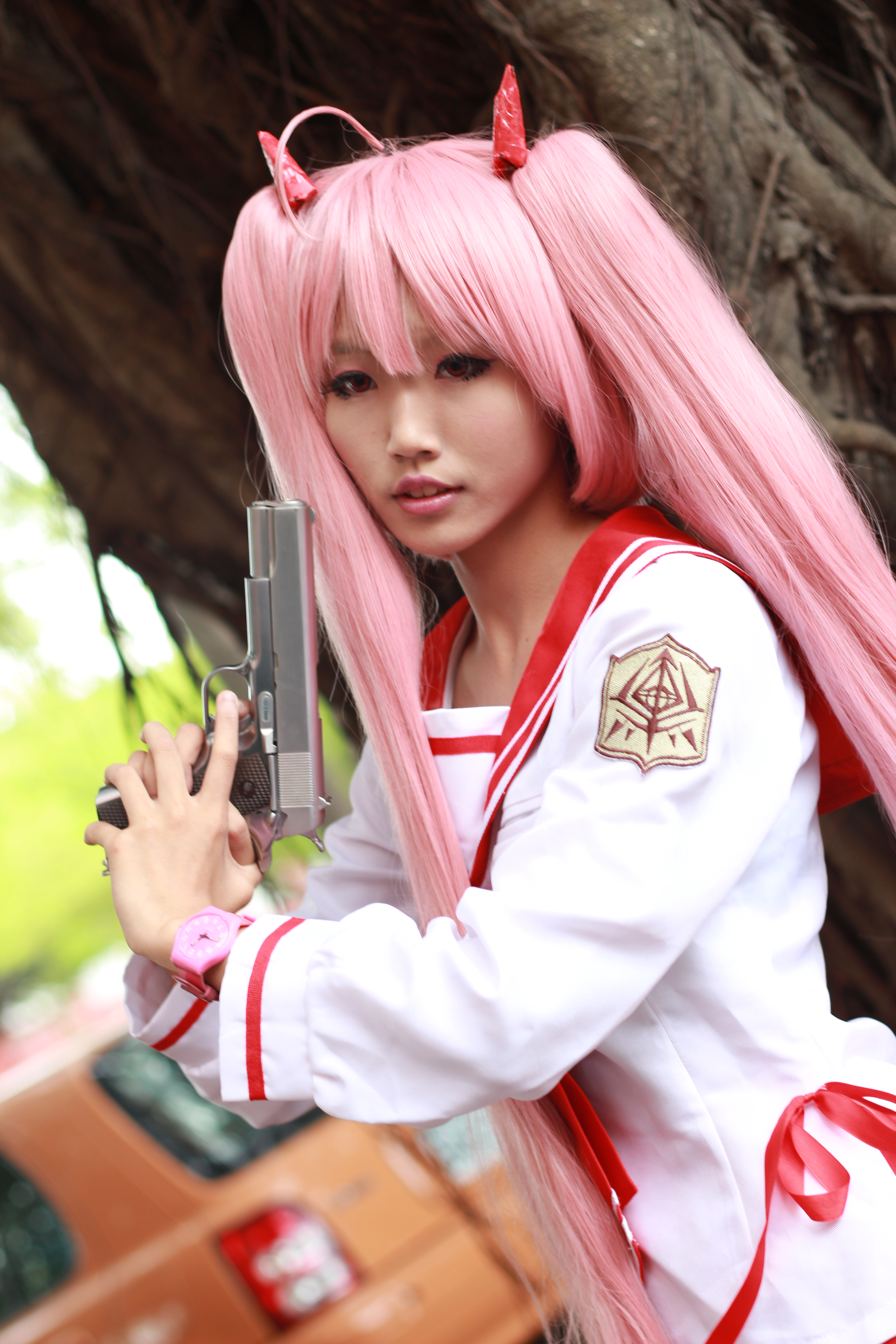 中文（台灣）: 2014年成大飛絮月同人誌展，《緋彈的亞莉亞》神崎·H·亞莉亞cosplayer。